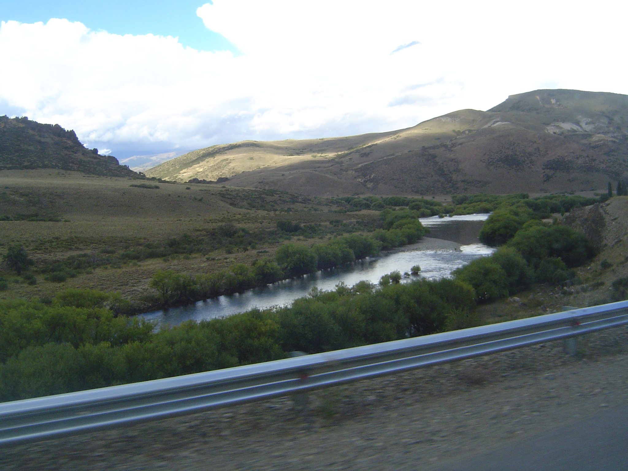 Rio Aluminé, cerca de su nacimiento en el lago Aluminé. Provincia de Neuquén, Argentina. 15 de marzo de 2007.